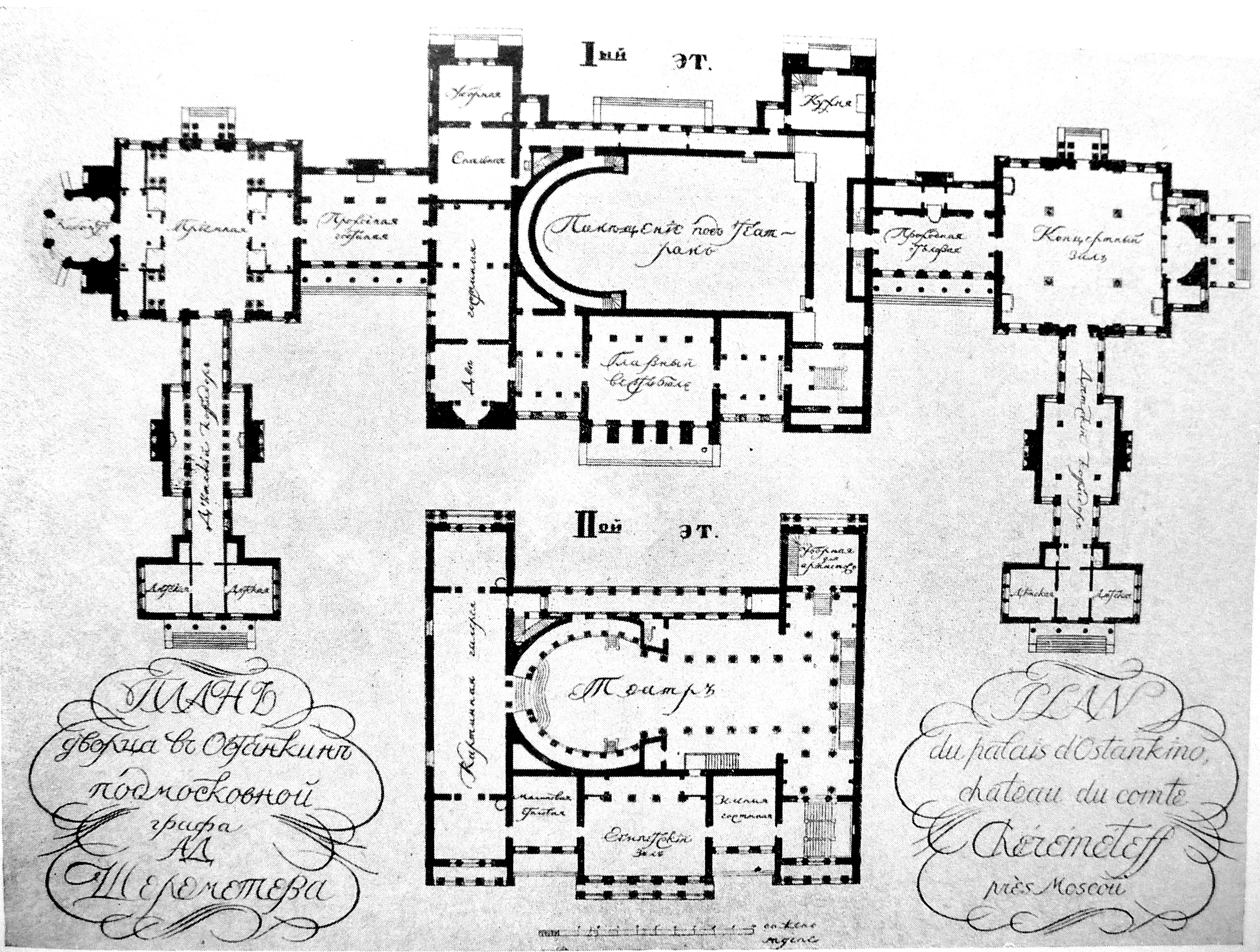 Останкино. Планы первого и второго этажей дворца.